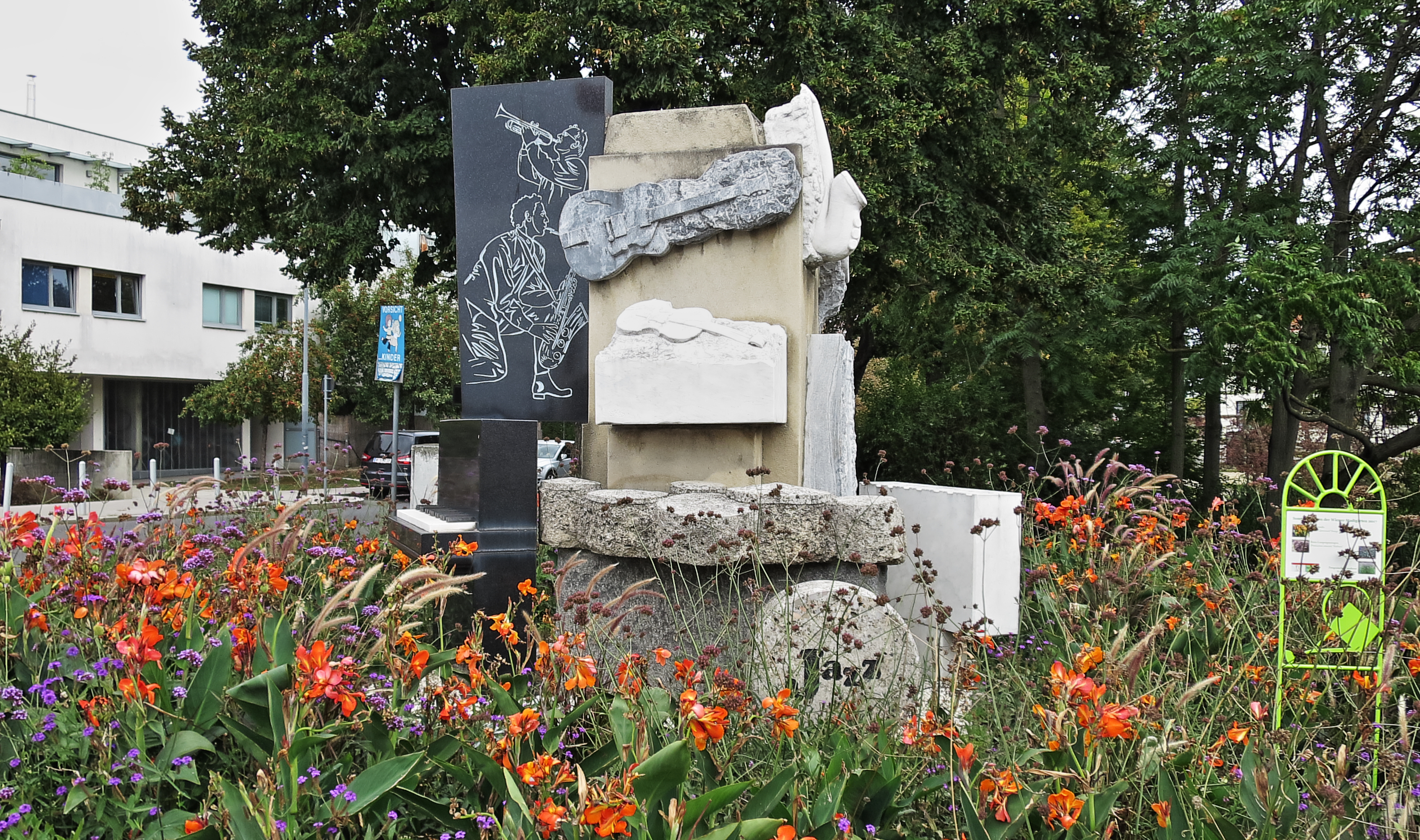 Bill-Grah-Park in Wien-Donaustadt, Jazz-Skulptur